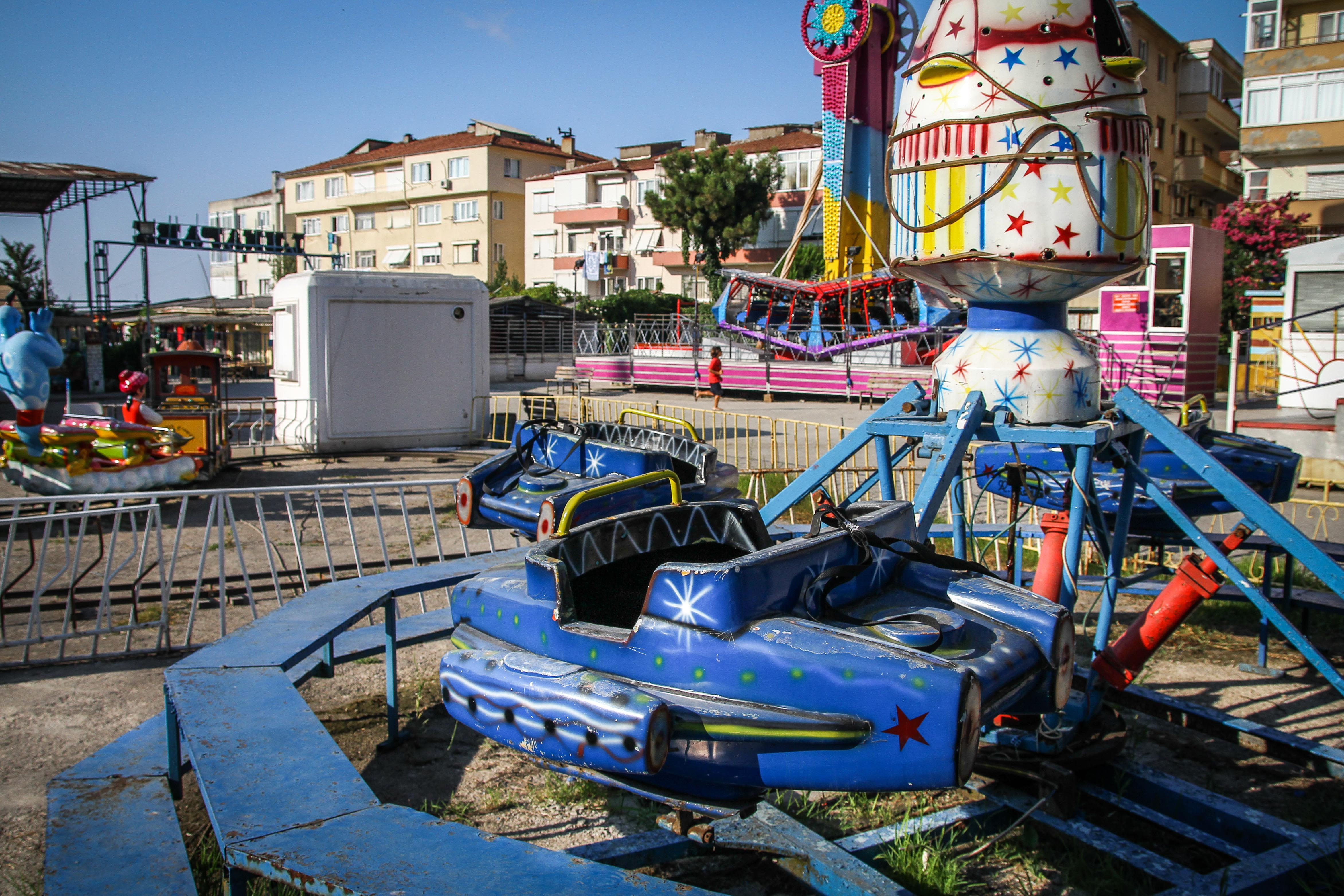 Çınarcık